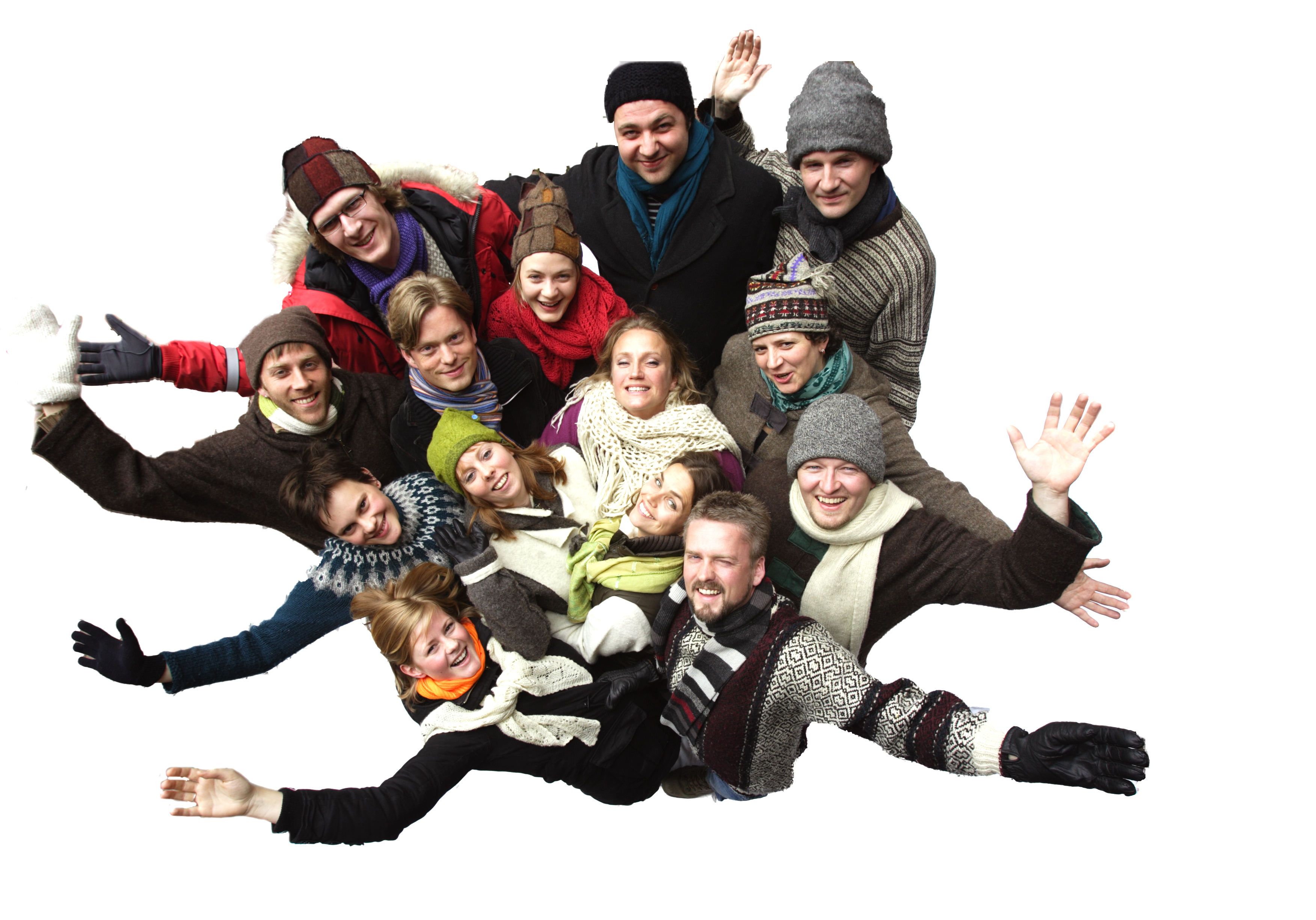 Føroyskt: Mpiri felaksmynd